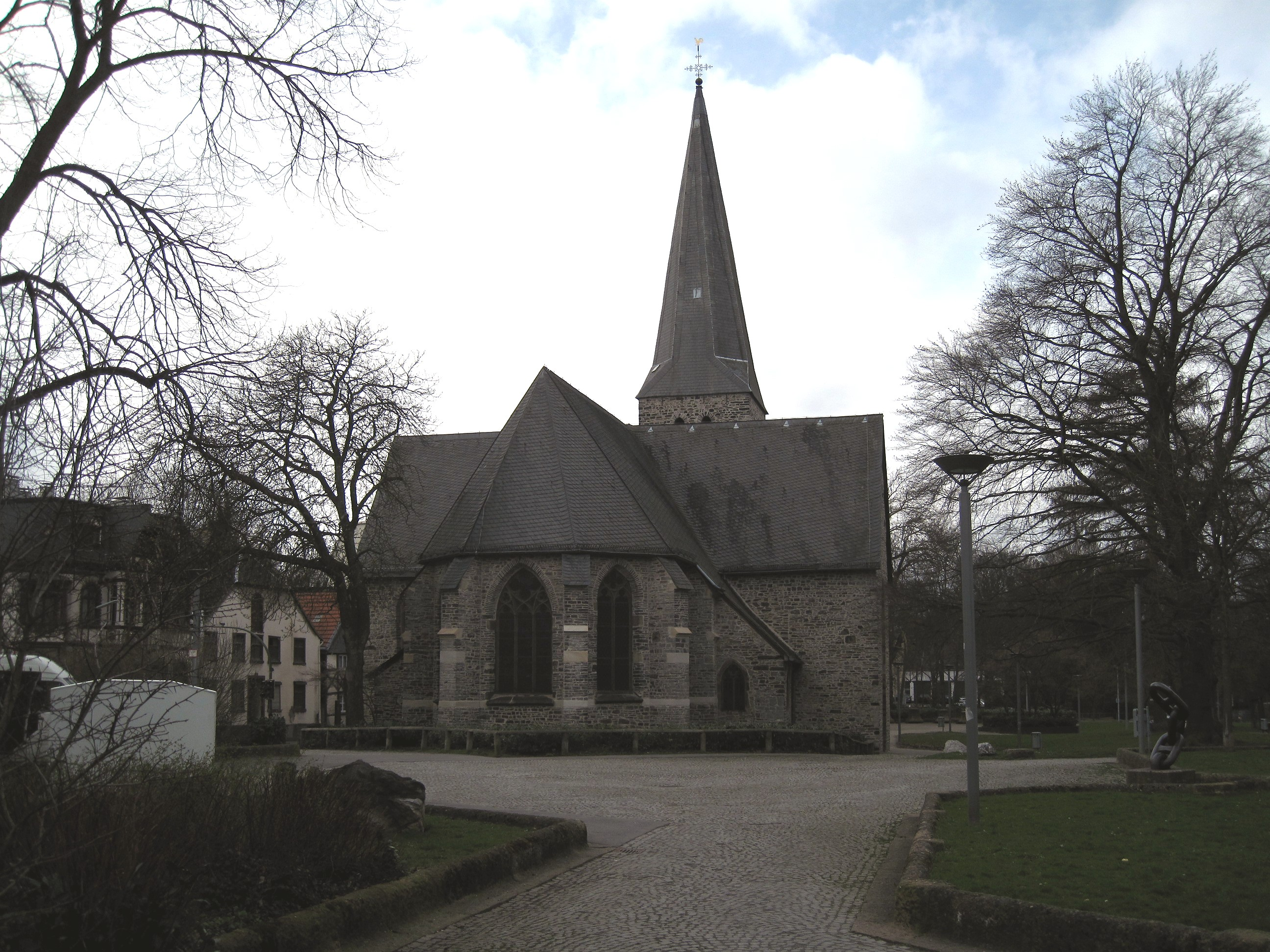 Ehemalige Pfarrkirche Sankt Pankratius (Bauernkirche) in Iserlohn.